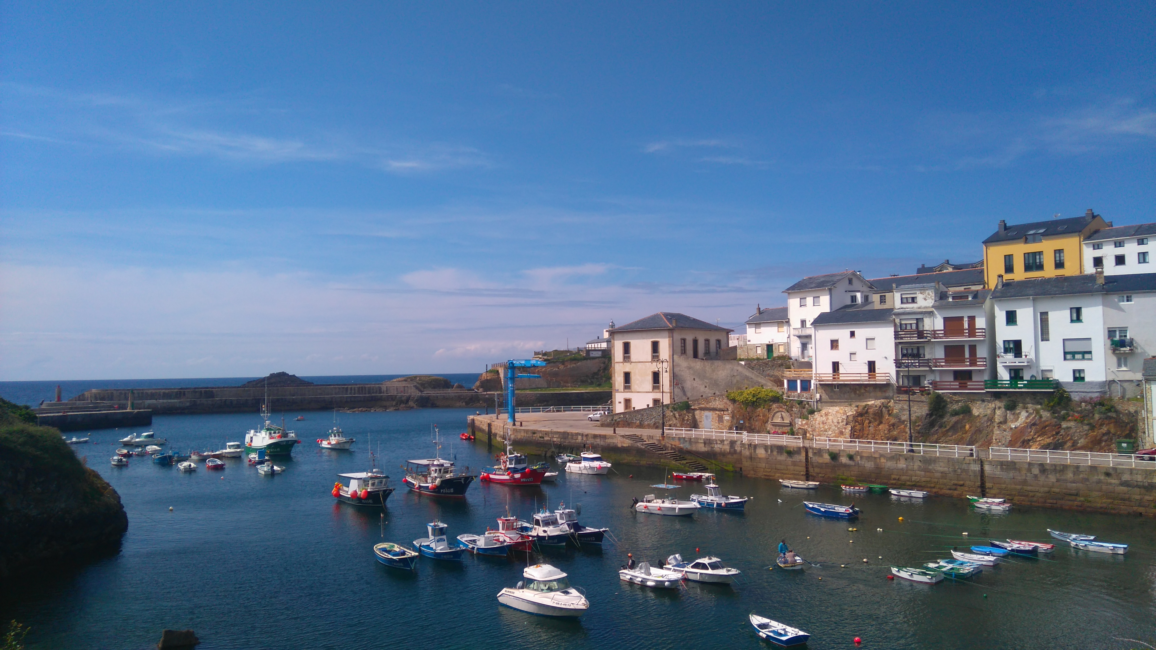 Puerto pesquero de Tapia de Casariego, España